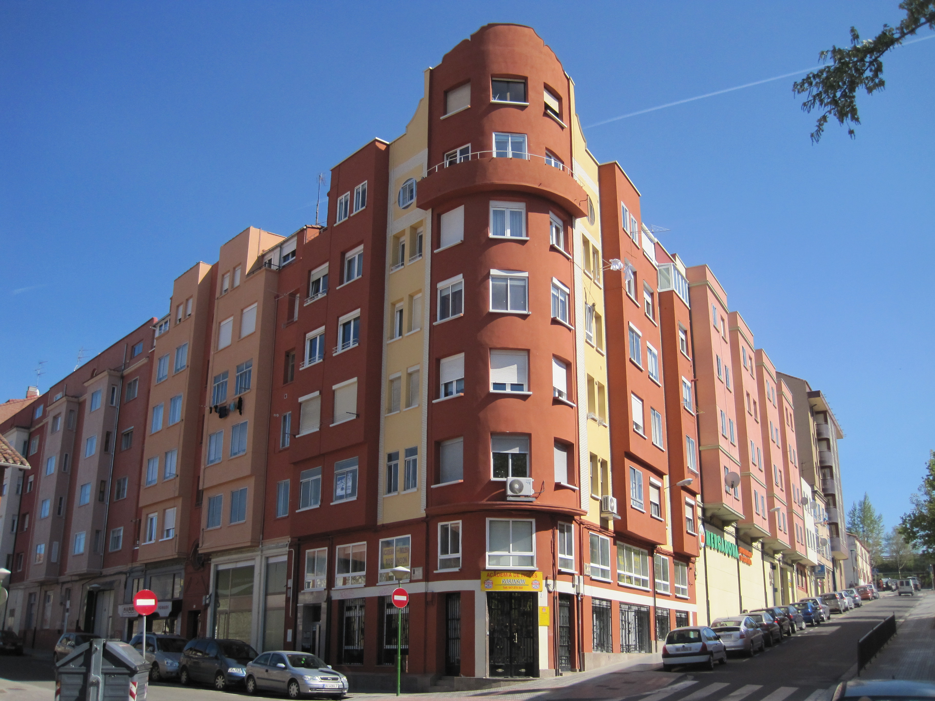 Vista de un edificio en la zona sur de la ciudad de Burgos, cerca del barrio de el crucero.